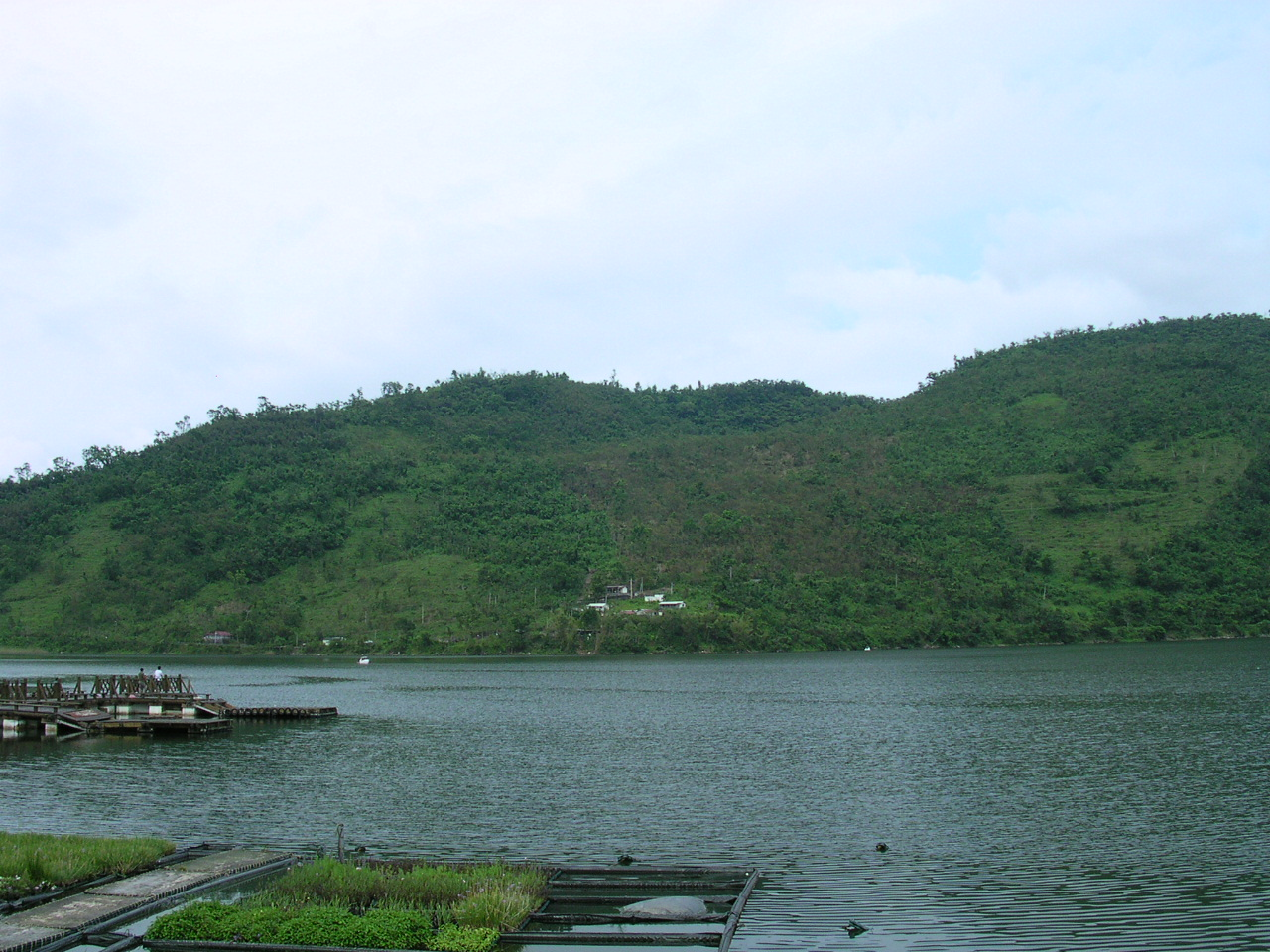 臺灣花蓮縣鯉魚潭 Bân-lâm-gú: Tâi-uân Hua-lian-kuān Lí-hî-thâm